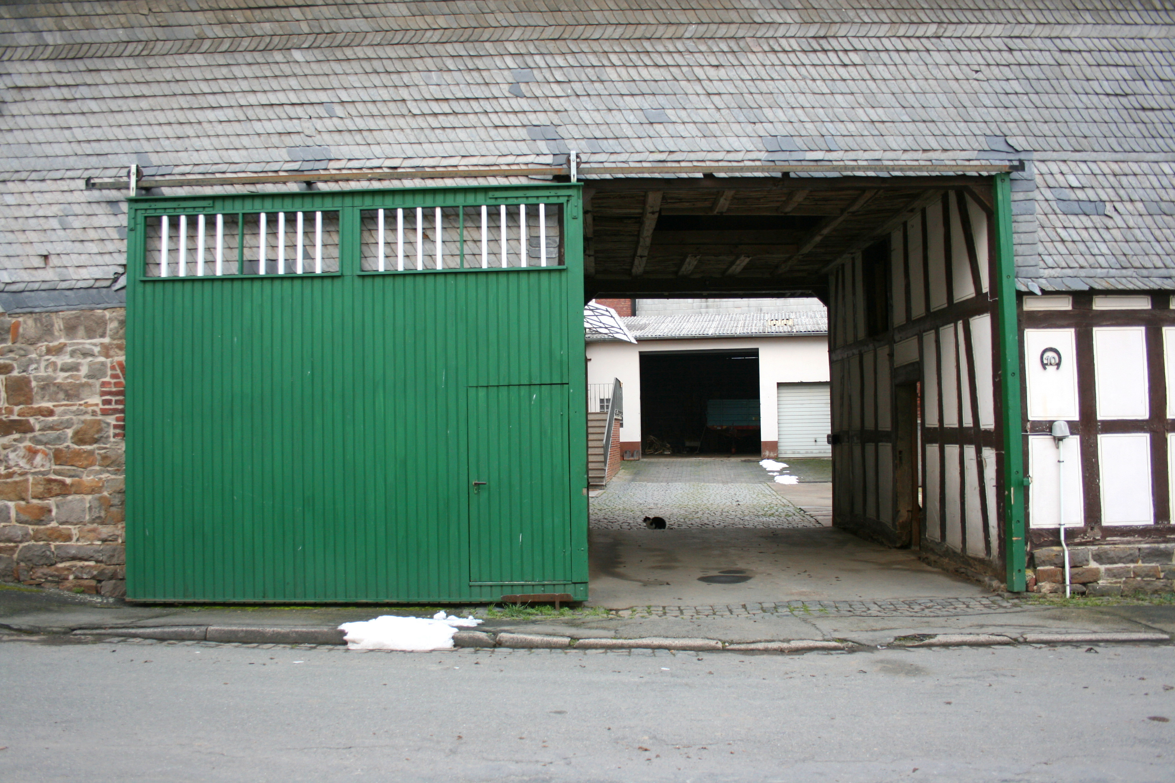 Gladenbach-Römershausen